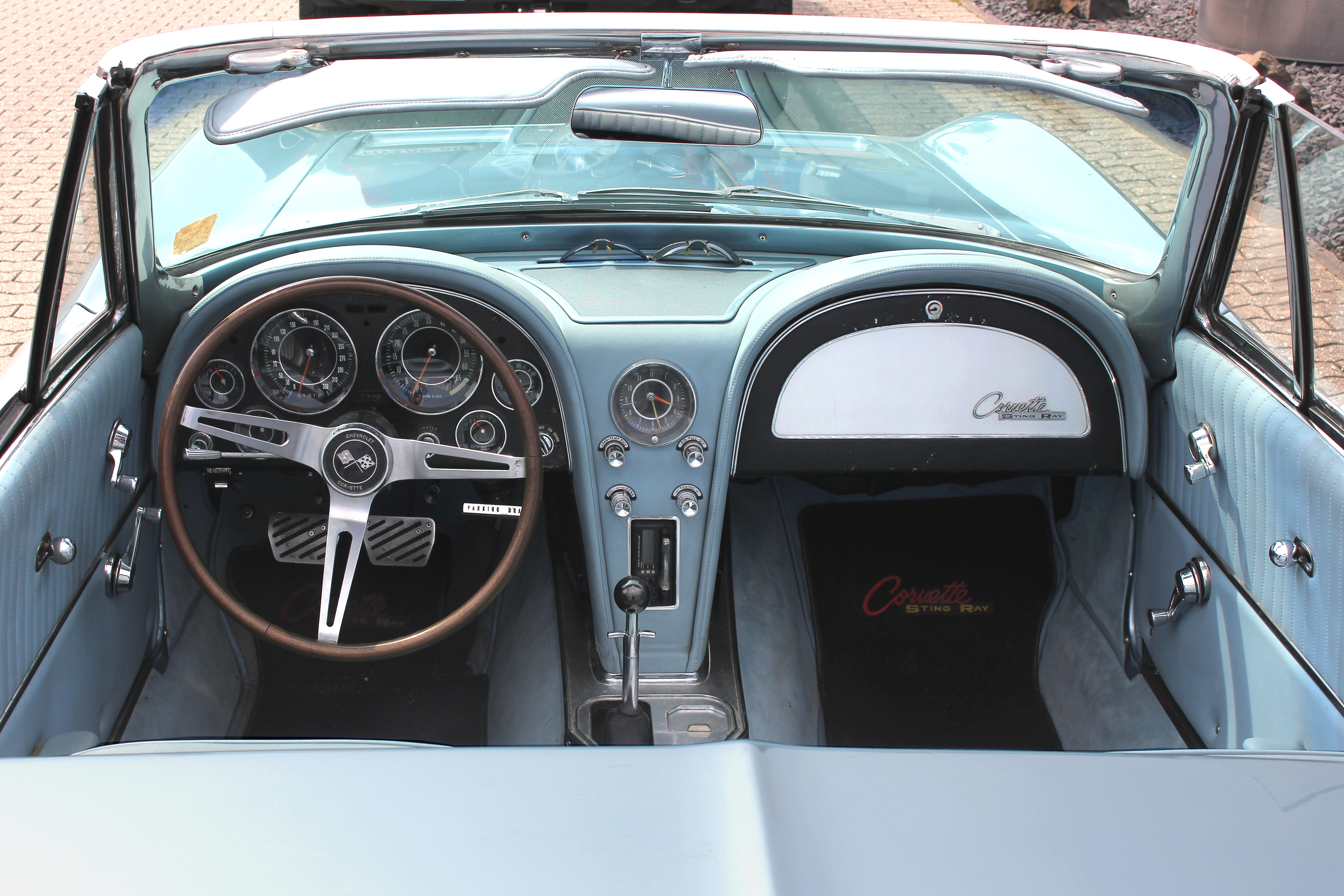 Chevrolet Corvette C2, Bauzeit 1962 bis 1967, Cockpit